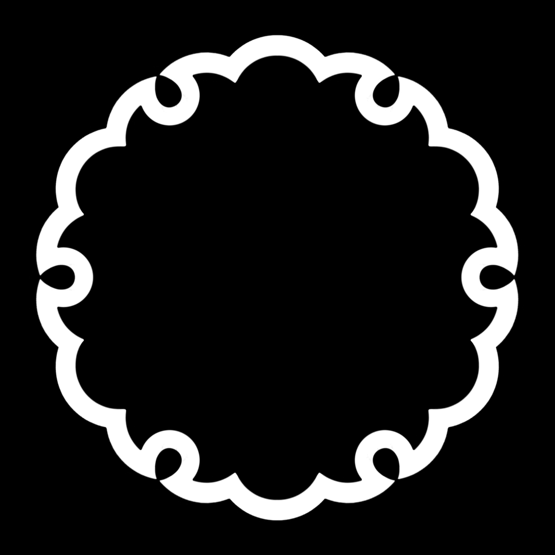 「雪輪」紋（染抜）